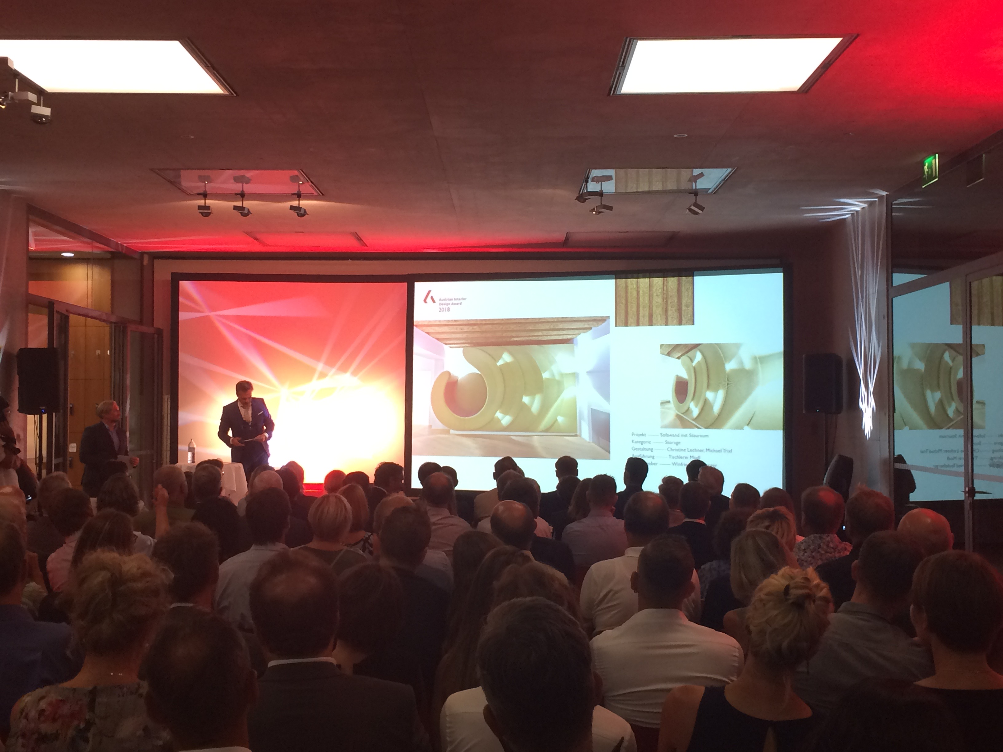 Bei dieser Abbildung handelt es sich um eine fotografische Aufnahme der Verleihung des Austrian Interior Architecture Award 2018 im Museum der Moderne in Salzburg. Zu sehen ist Tarek Leitner vor der Leinwand. Projiziert wird eine Übersichtsgrafik zum Gewinnerprojekt "Sofawand" von Christine Lechner und Michael Trixl.